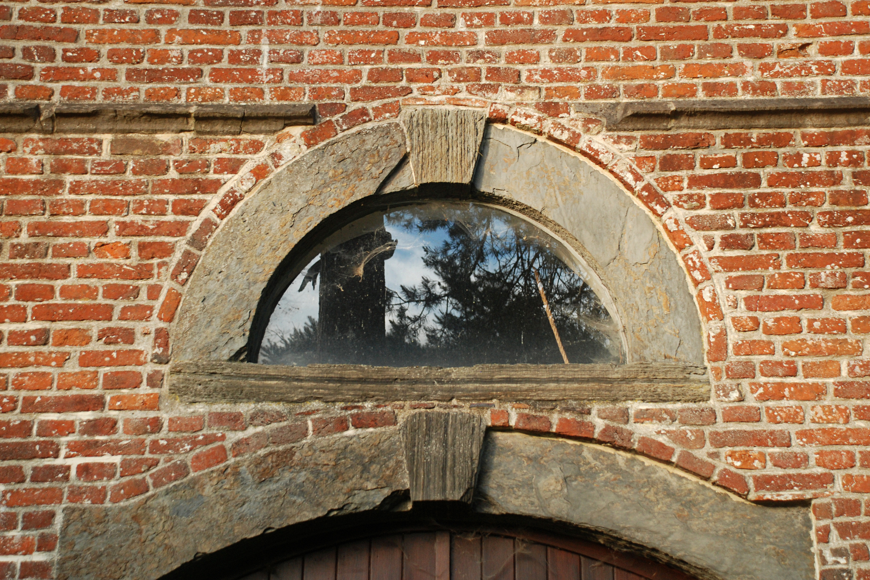 Belgique - Brabant wallon - Court-Saint-Étienne - Chapelle Notre-Dame de Sart-Messire-Guillaume